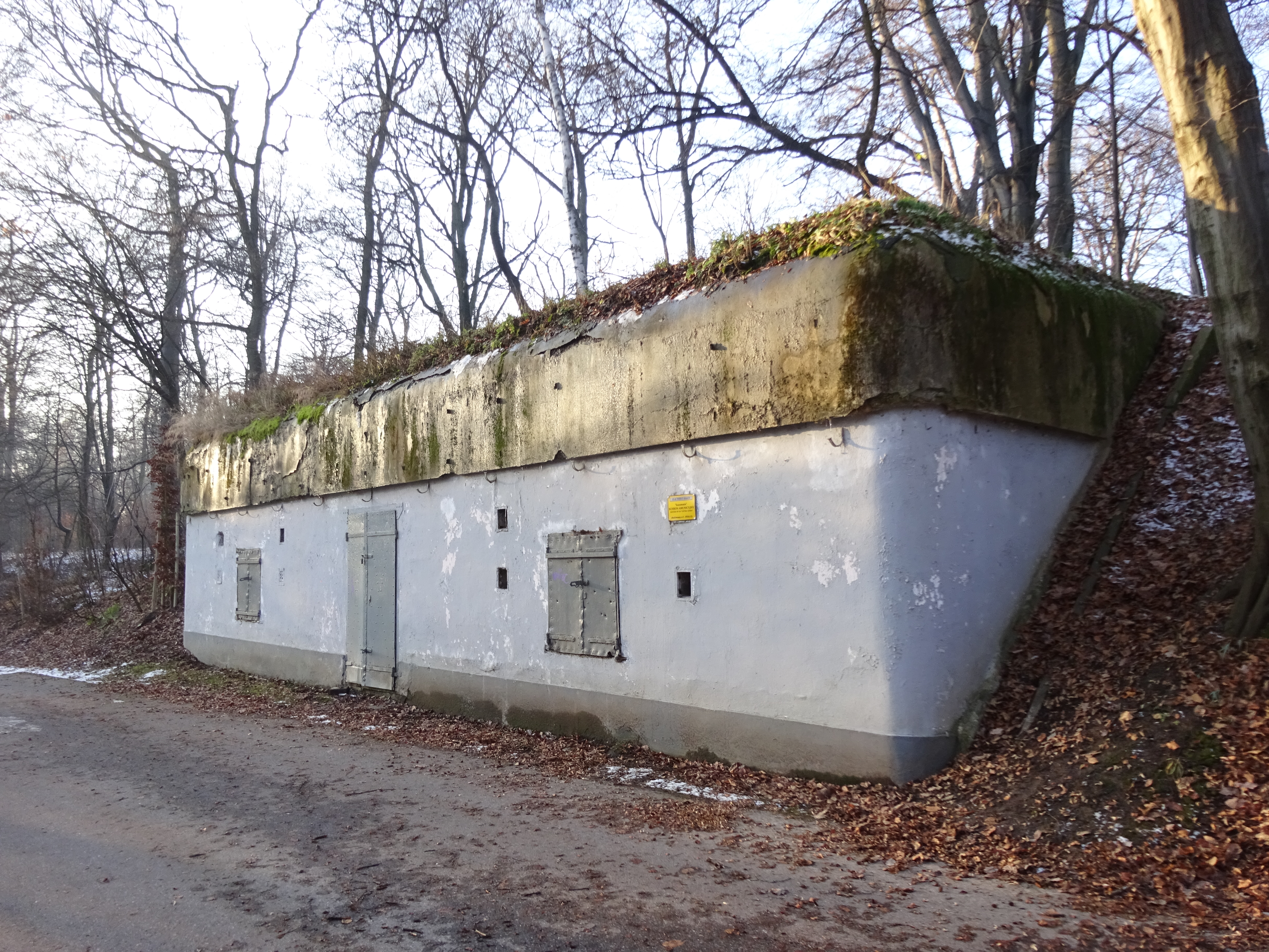 Schron amunicyjny ,,Wolski Las" - obiekt Twierdzy Kraków w III obszarze warownym. Las Wolski, Kraków.